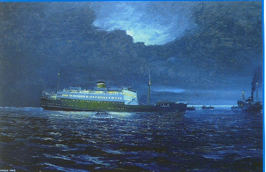 Oil Painting